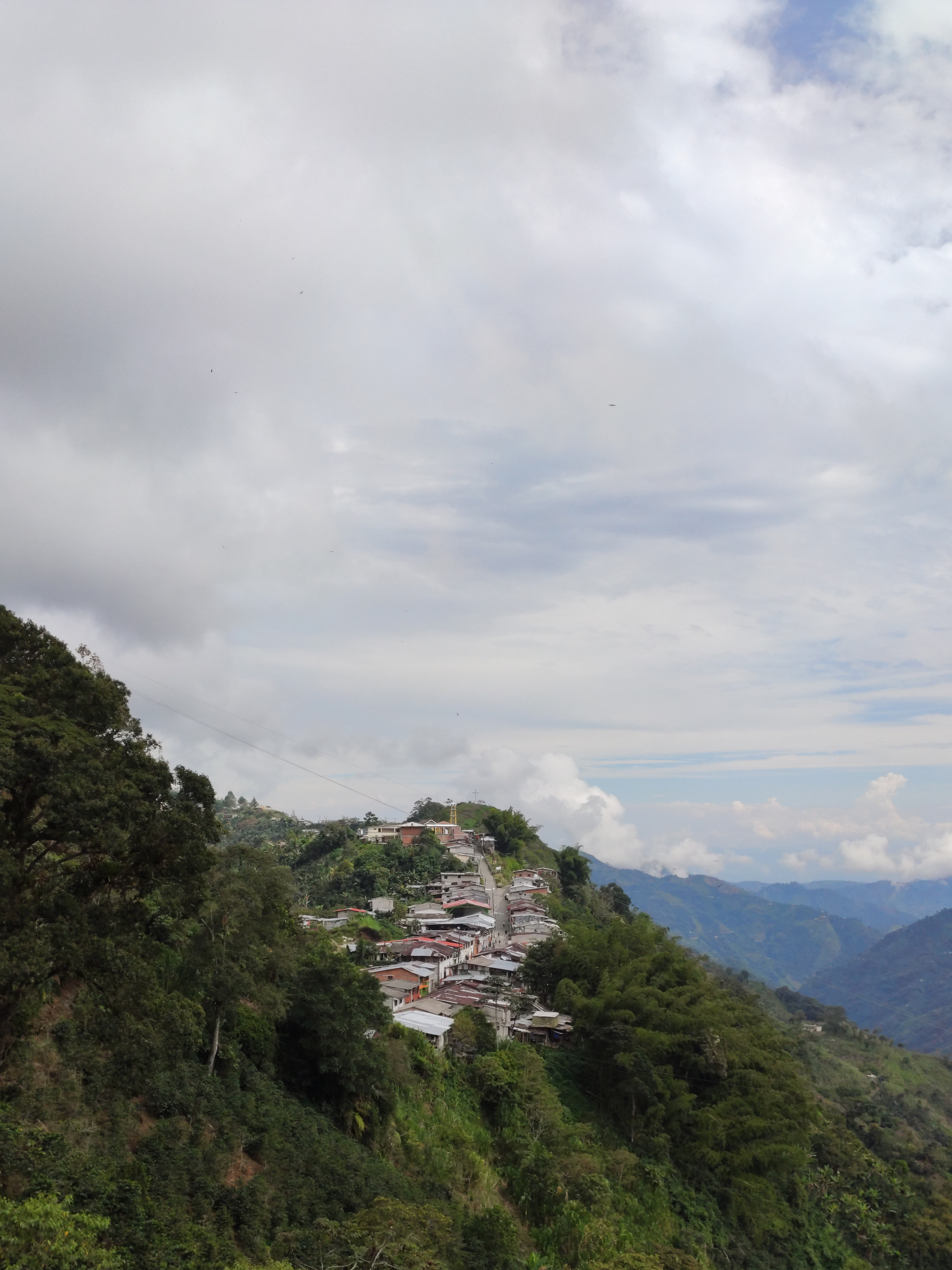 Corregimiento de San Daniel